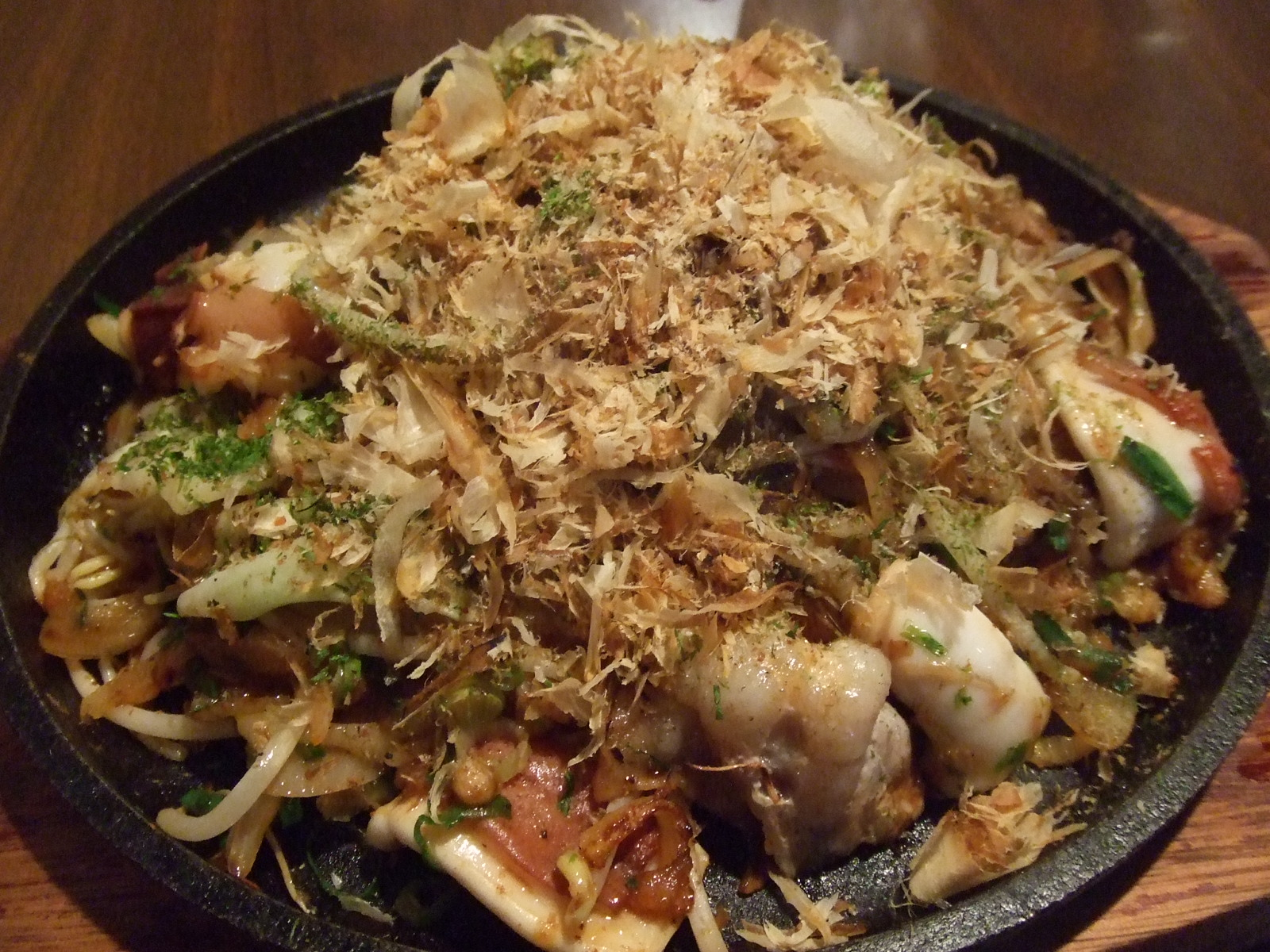 焼うどん（関門たこ入り）